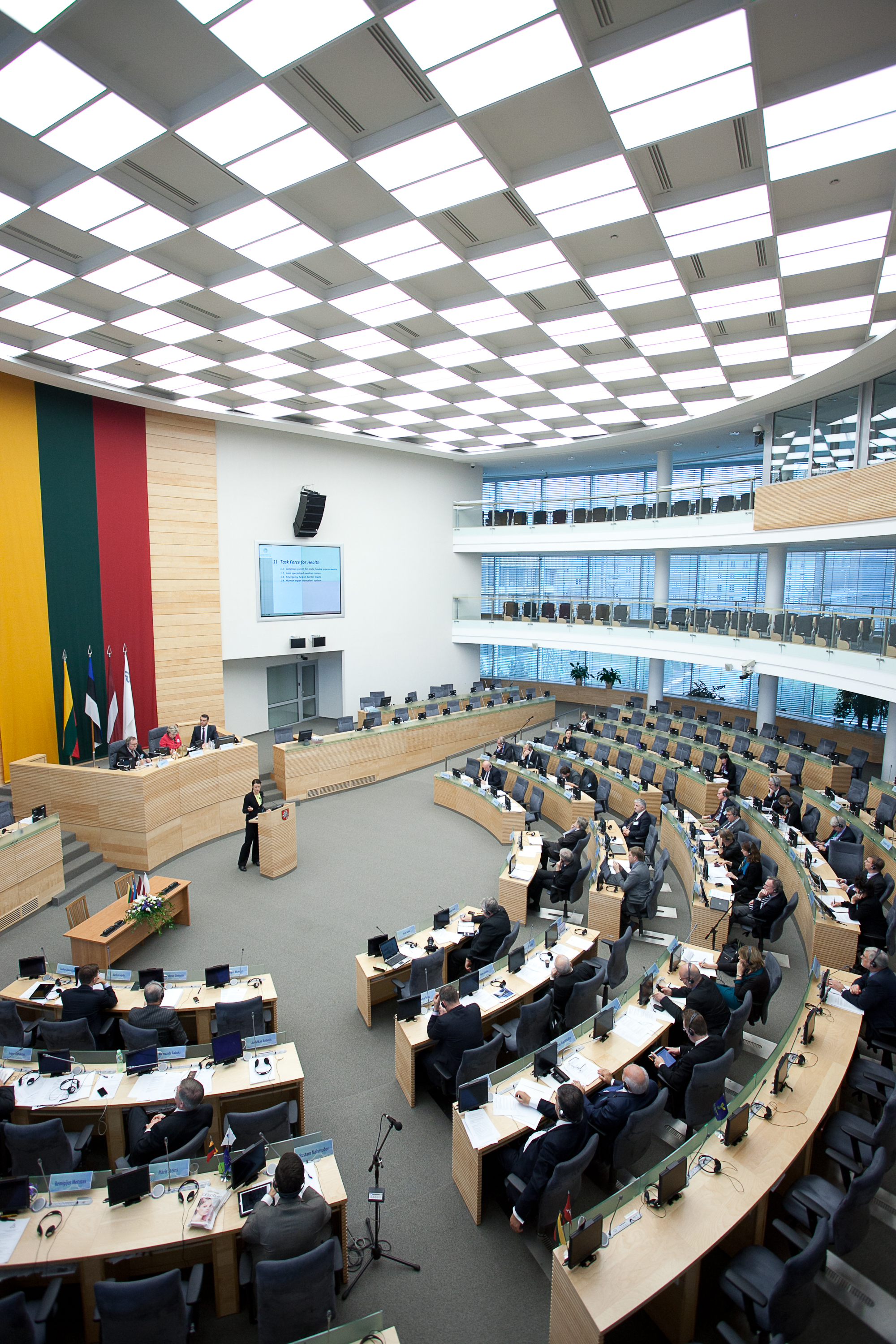 2012.gada 9.novembris. Saeimas deputāti piedalās Baltijas Asamblejas 31.sesijā, kas šogad notiek Lietuvas galvaspilsētā Viļņā. Foto: Ernests Dinka, Saeimas Kanceleja